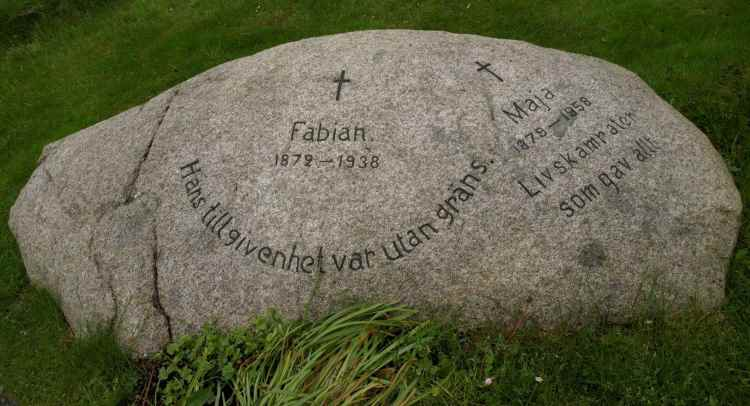 Fabian Månsson och Maria (Maja) Qvist. Fabians "tillgivenhet var utan gräns". Maria var "Livskamraten som gav allt".